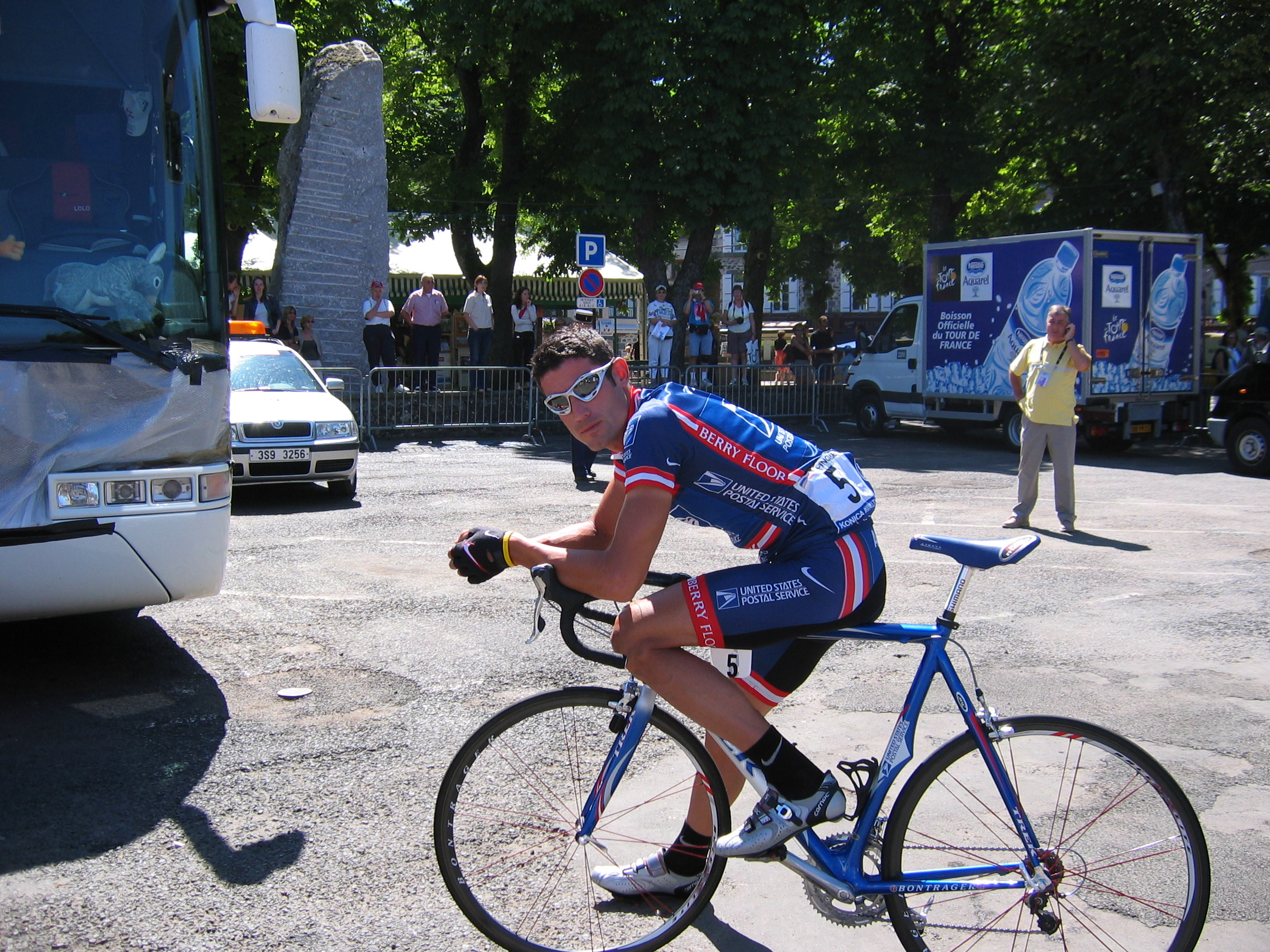 Photo prise par sanguinez à Saint-Flour pendant le Tour de France 2004. Il s'agit de l'Américain George Hincapie. Georges Hincapie during the 2004 Tour de France